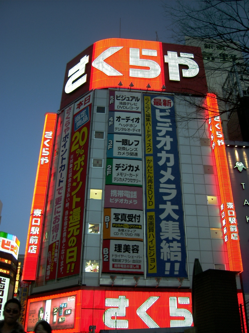 Sakuraya_Electric_shop_Shinjuku Japan